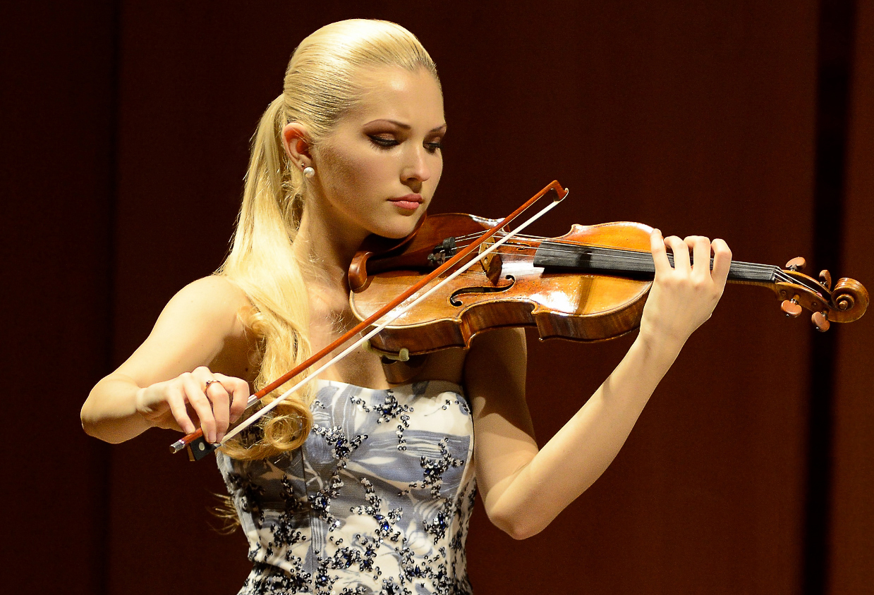 Anastasiya Petryshak durante il concerto del 5 giugno nella sala Santa Cecilia a Roma, con il violino di Antonio Stradivari del 1715 "Il Cremonese".